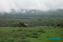 Sanabria